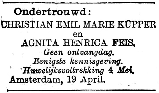 Huwelijksaankondiging Emil Küpper (Theo van Doesburg en Agnita Feis. Afkomstig uit Het Nieuws van den Dag, woensdag 20 april 1910, p. 18.